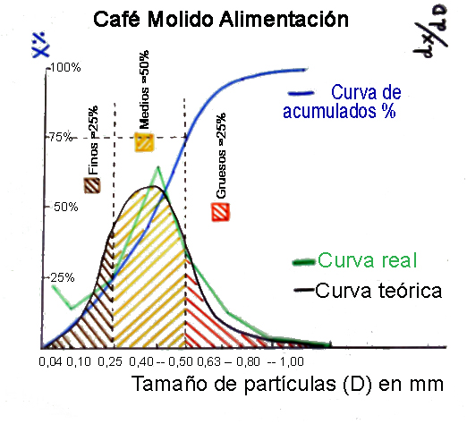 Grafica de % de tamaño de particulas